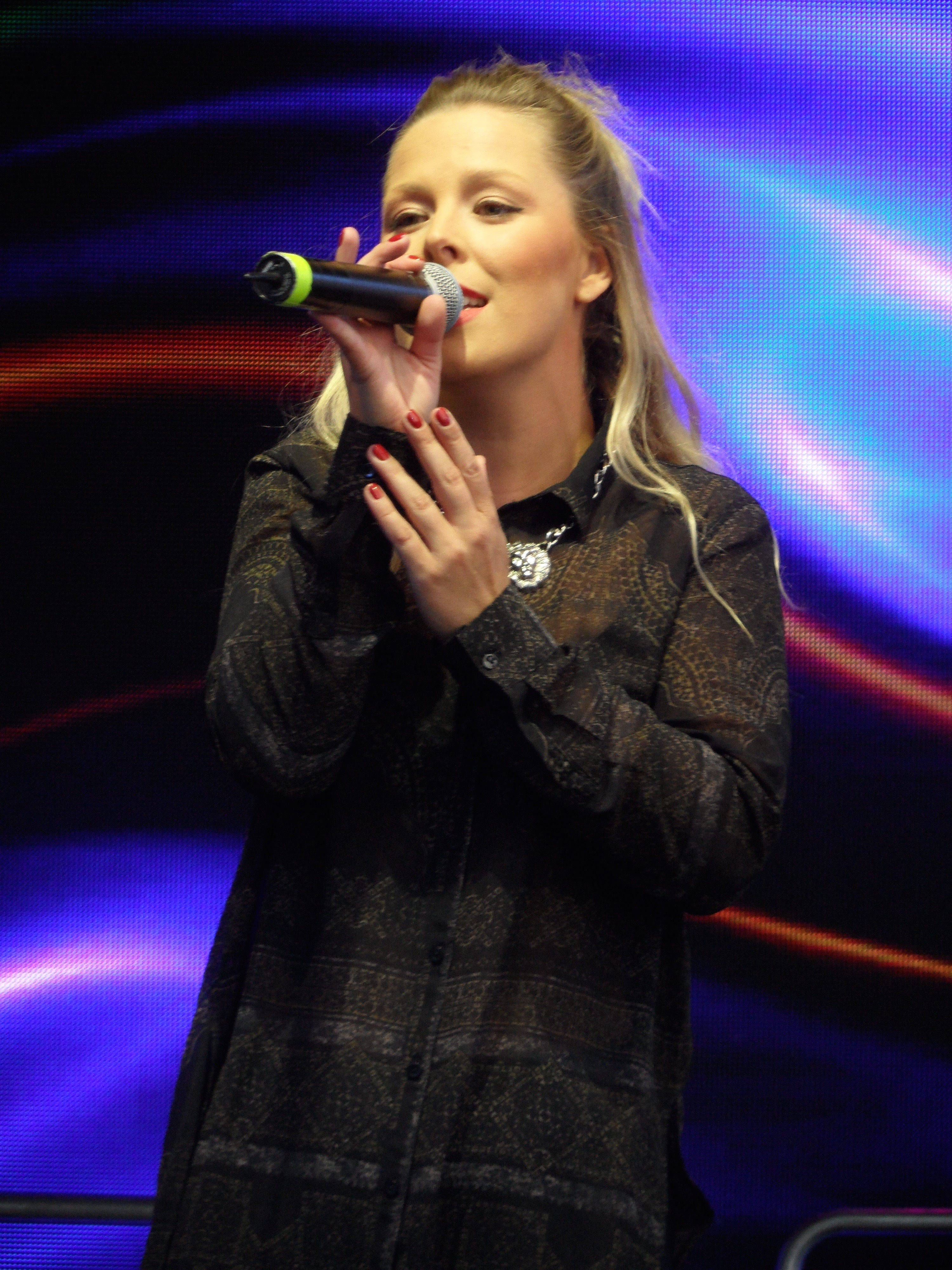 Leonore Bartsch beim Gänseliesel-Fest in Göttingen